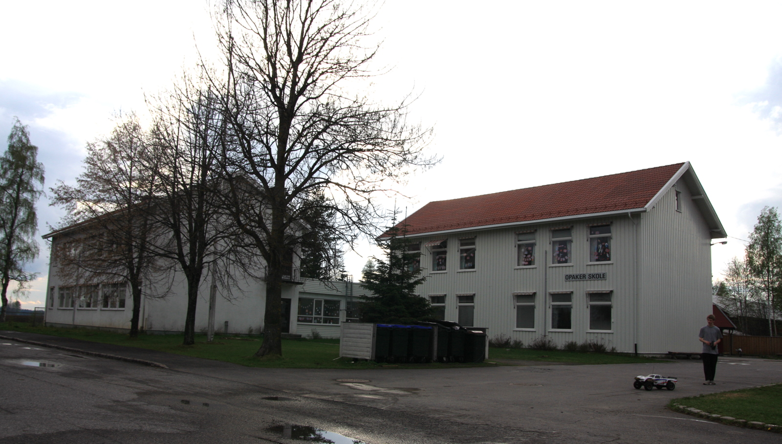 Opaker skole